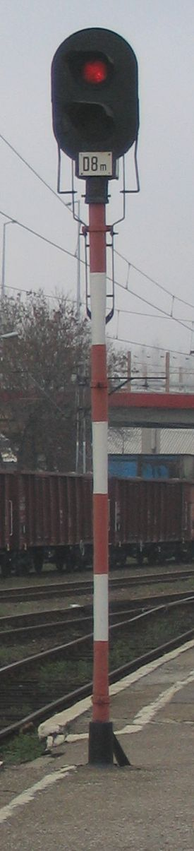 Tarcza zaporowa D8 na stacji Kutno